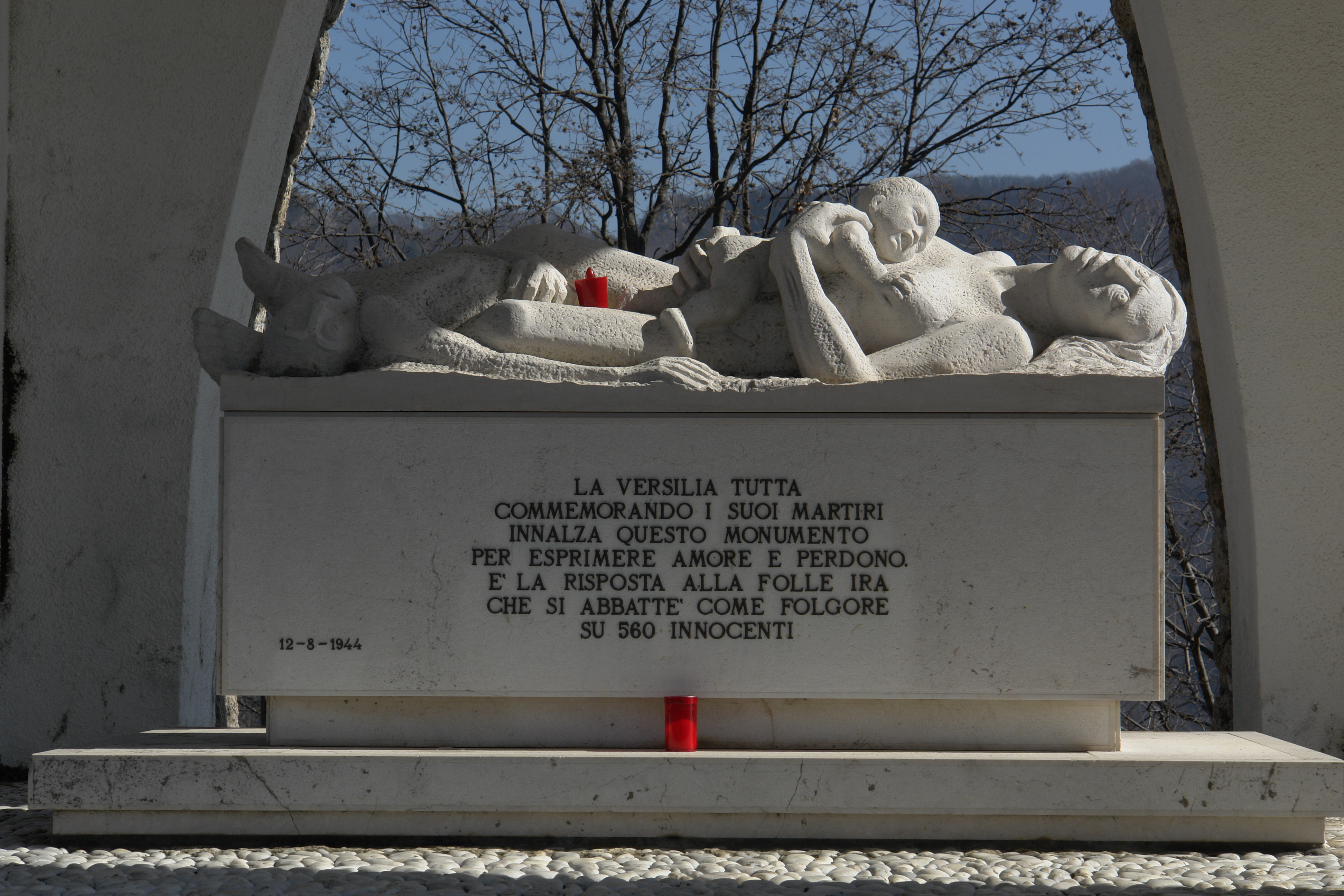 Sant' Anna di Stazzema, Skulptur Mutter und Kind (im Mahnmal)